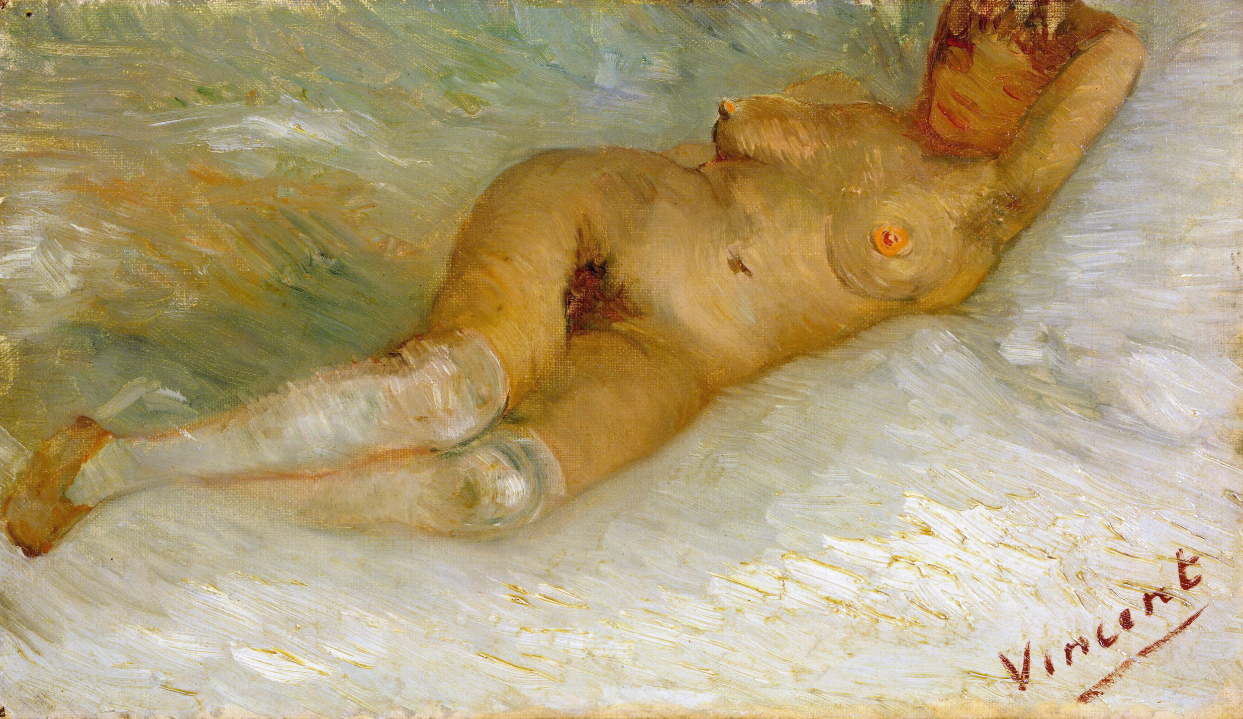 Liggend naakt